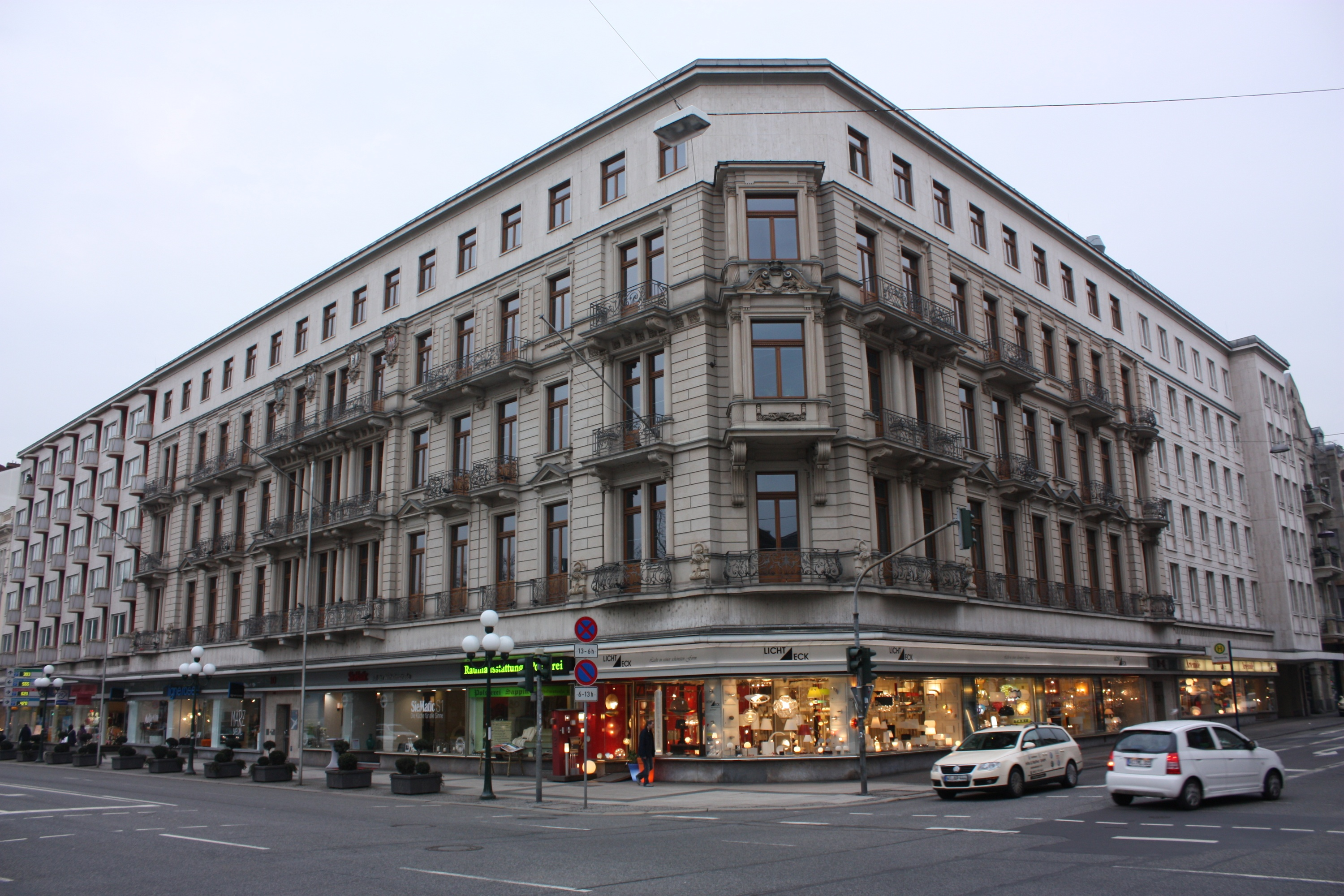 Wiesbaden, Hessen: Hauptsitz der Hessen Mobil. Erbaut als "Hotel Metropol", Bauantrag 1894 vom Architekt Friedrich Lang